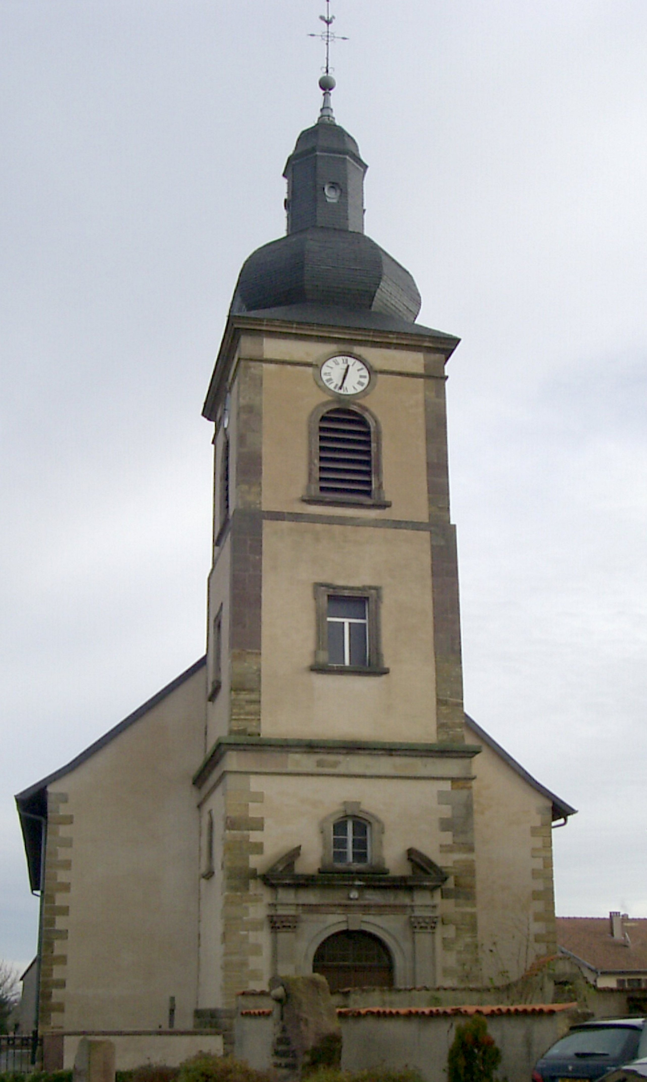 L'église Saint-Barthélemy à Léning